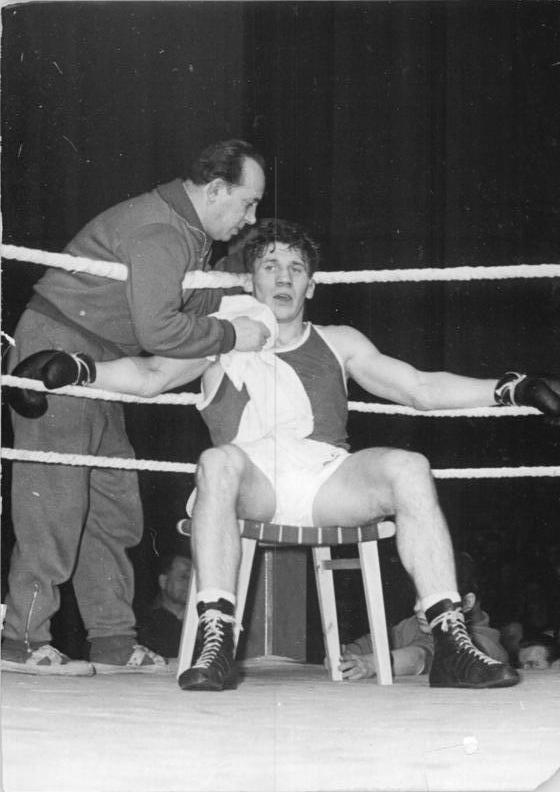 Motzkus, Sonnenberger Zentralbild Funck 10.12.1955 Ungarischer Boxsieg gegen DDR. In der Leipziger Messehalle II standen sich am Freitag, dem 9. Dezember 1955, im Boxländerkampf die Staffeln der DDR und Ungarn gegenüber. Die Gäste kamen dabei im Gesamtergebnis zu einem 12:8 Erfolg. UBz: . Der DDR-Halbschwergewichtler Motzkus mit Trainer Sonnenberger während einer Kampfpause.